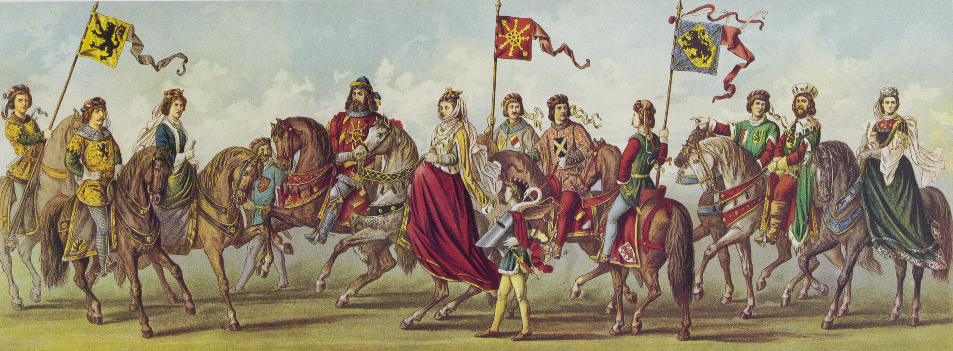 Tony Avenarius: Historischer Festzug veranstaltet bei der Feier der Vollendung des Kölner Doms am 18. October 1880. Tafel XVIII